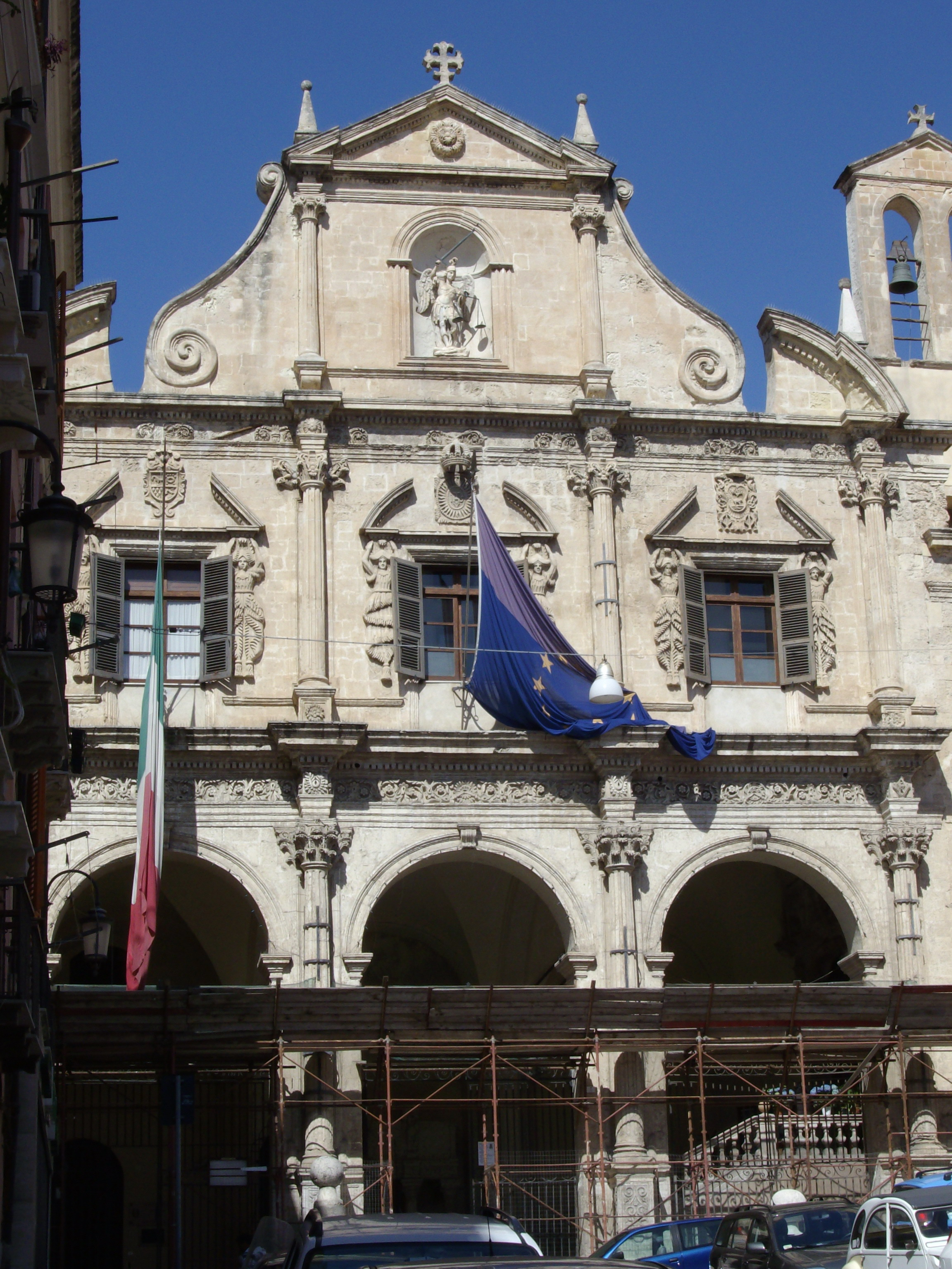 Chiesa di san Michele (XVII secolo) a Cagliari, con ingresso dell'ospedale militare